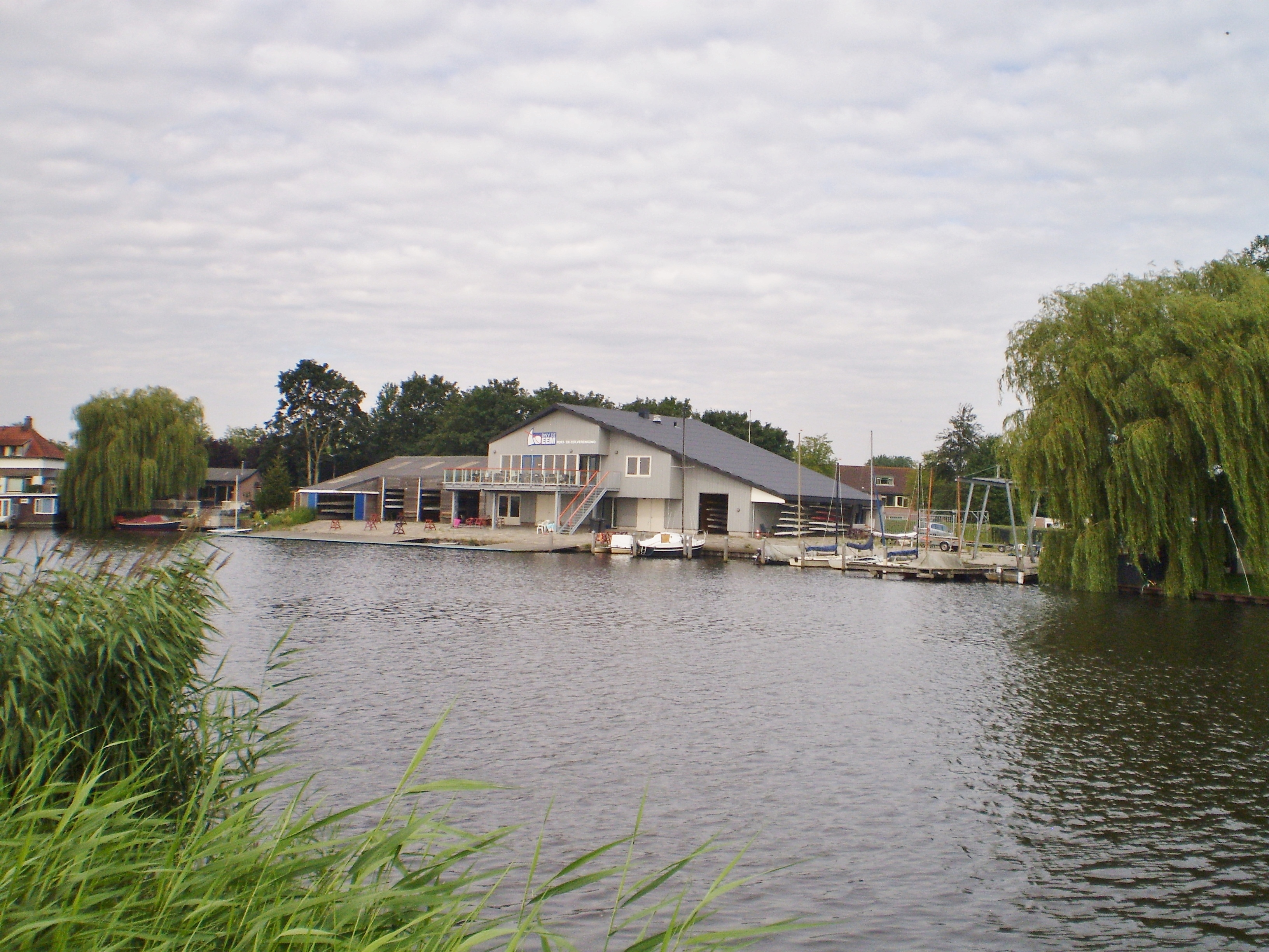 Roeivereniging De Eem bij Baarn